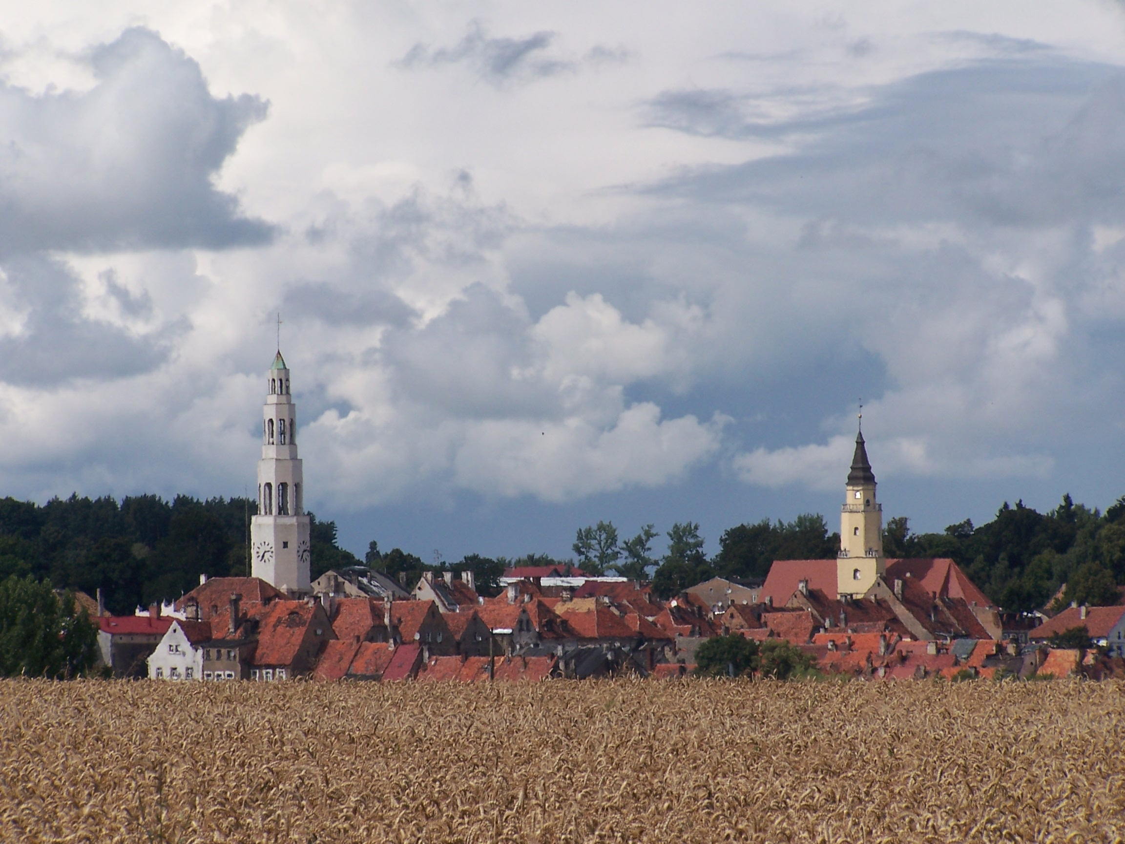 Panorama of Gryfów Śląski